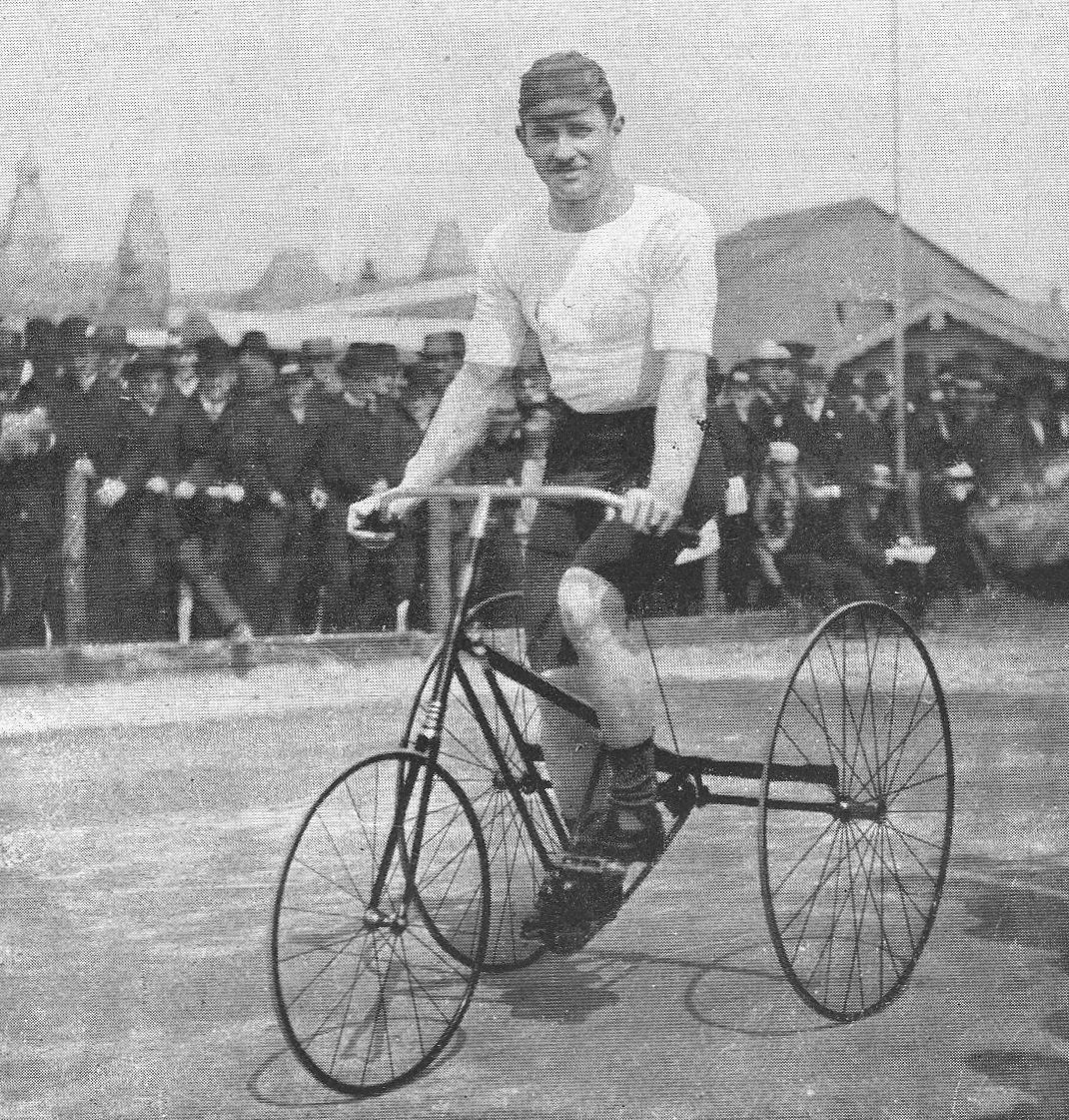 Pim Kiderlen, niederländischer Radrennfahrer, im Jahre 1886 (1868-1931)